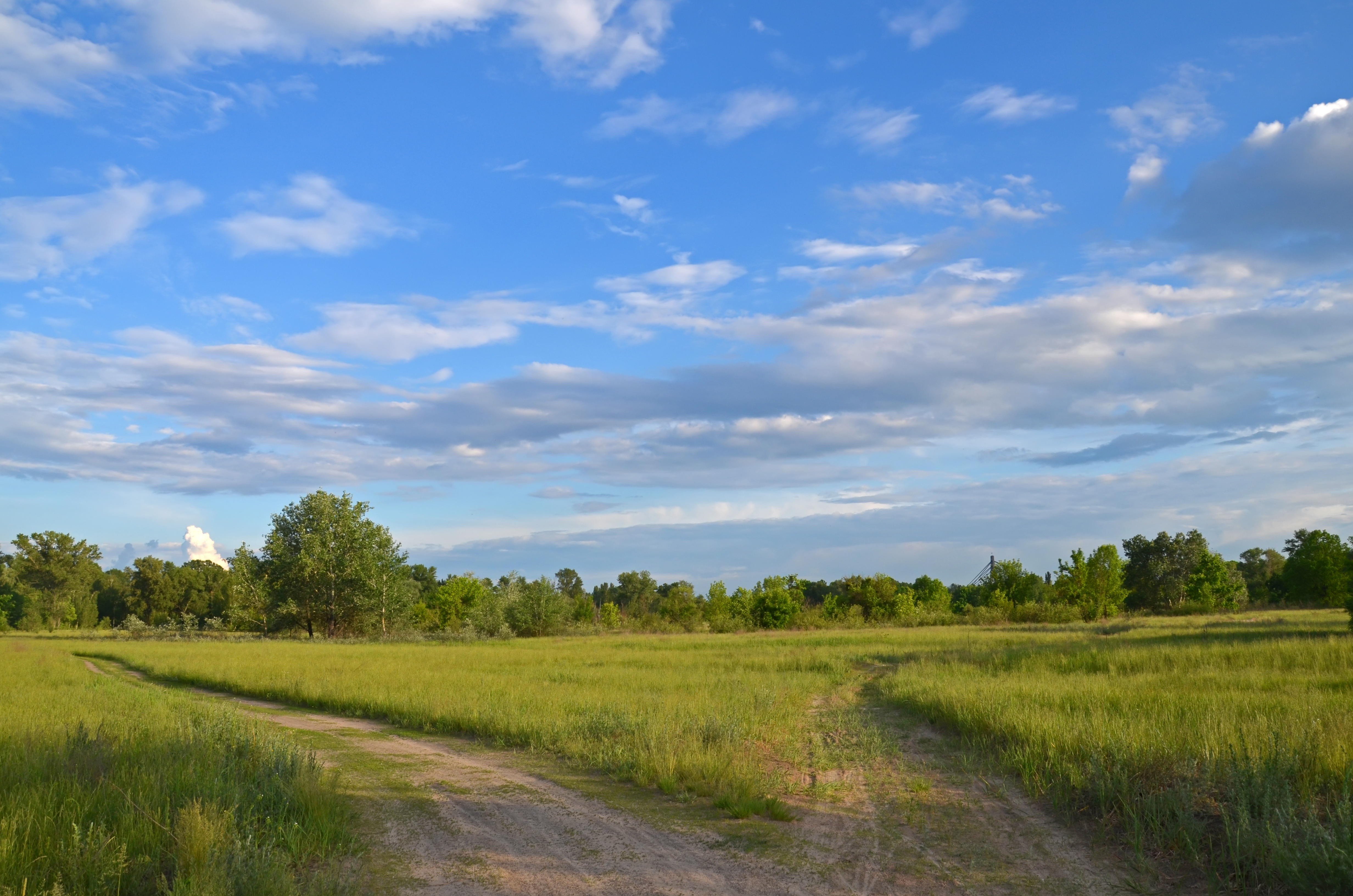 Бобровня, Деснянський район